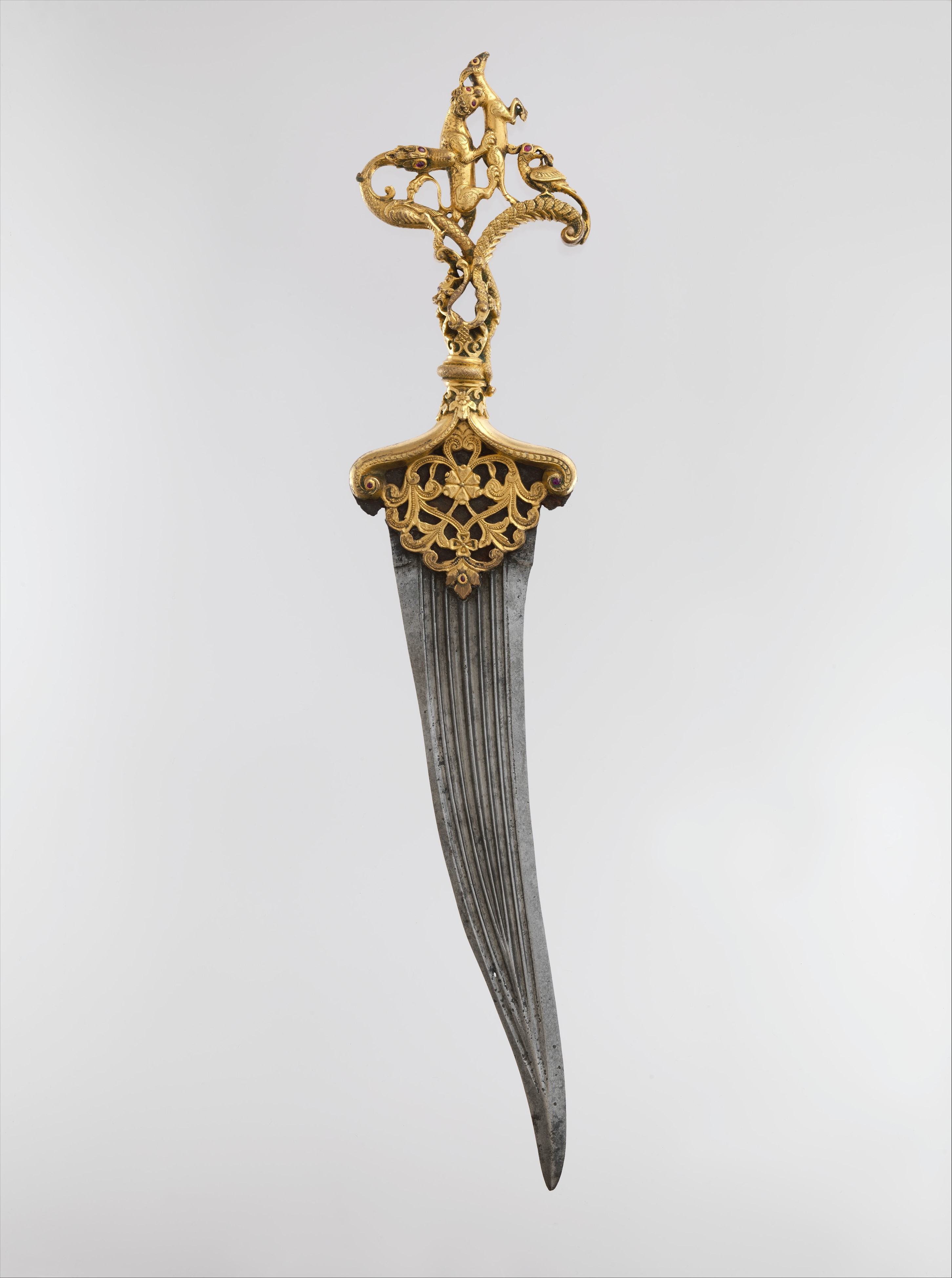 Dagger; Arms and Armor